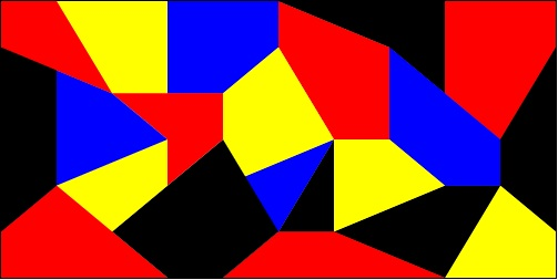 théorème des quatre couleurs